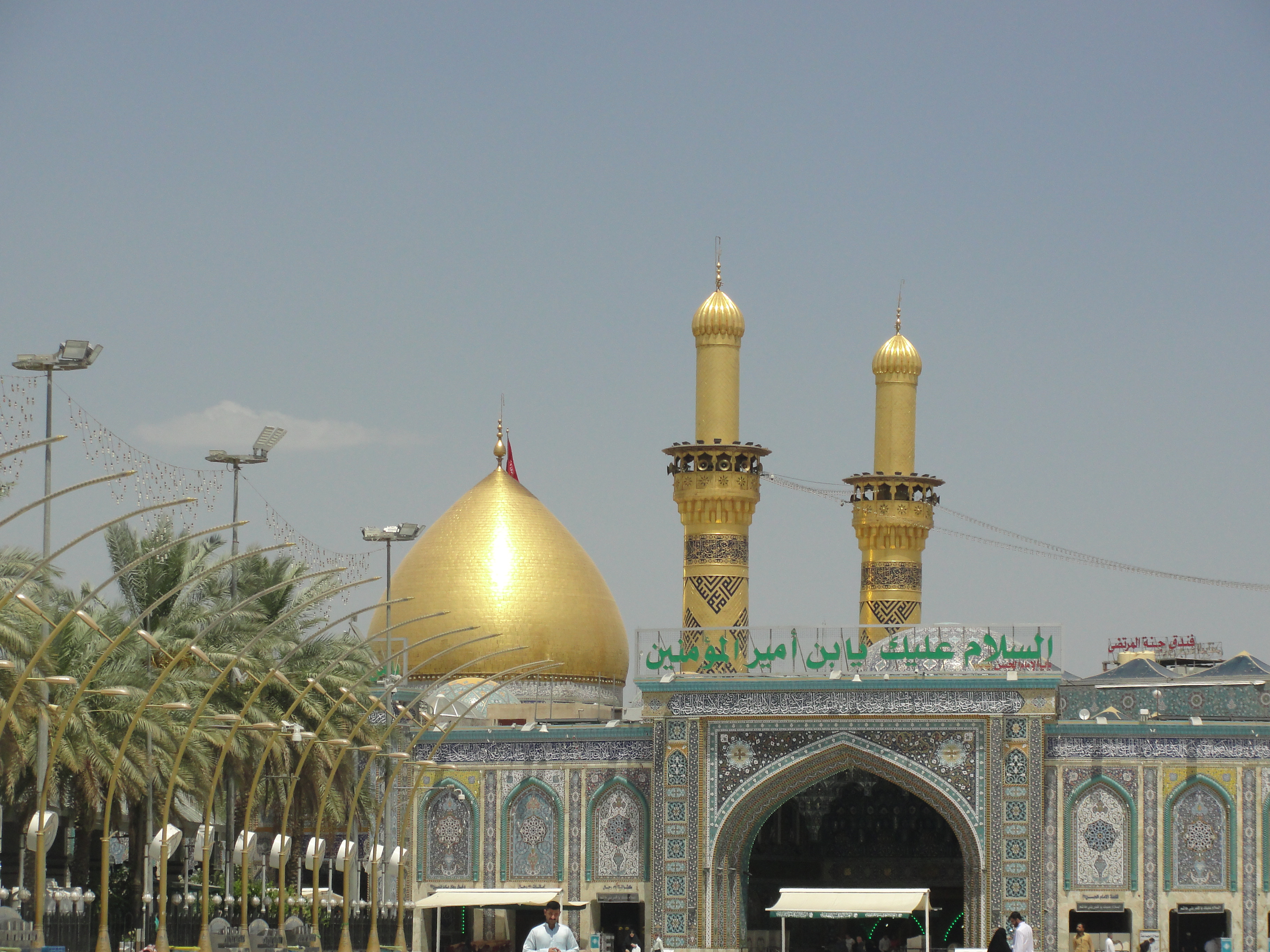 العتبة العباسية وهو المكان الذي دفن فيه العباس بن علي في كربلاء في العراق بعد معركة كربلاء عام 61 هـ يقصده الشيعة من كل مكان لزيارته والتبرك بمرقده.